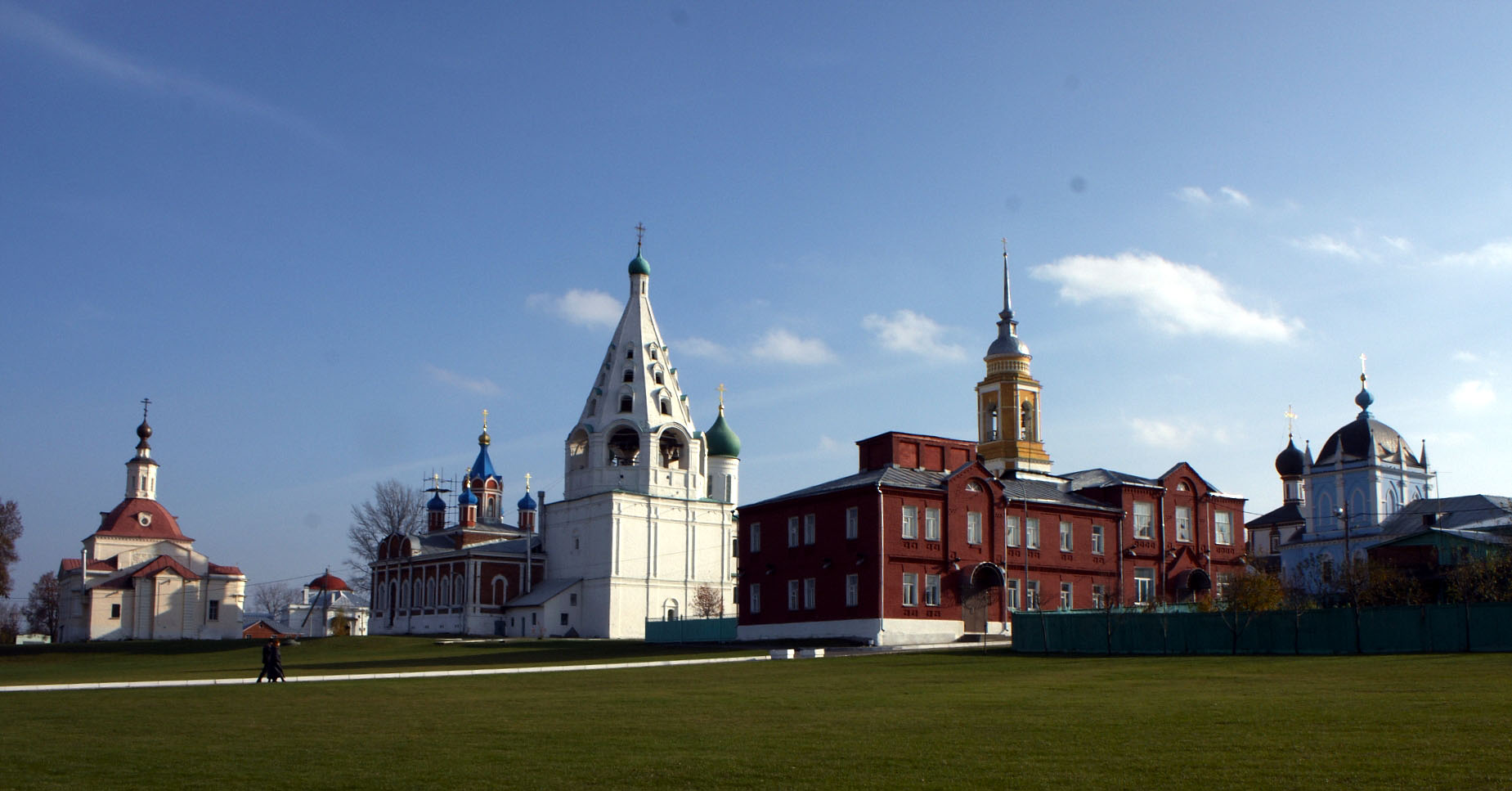 Коломенский кремль